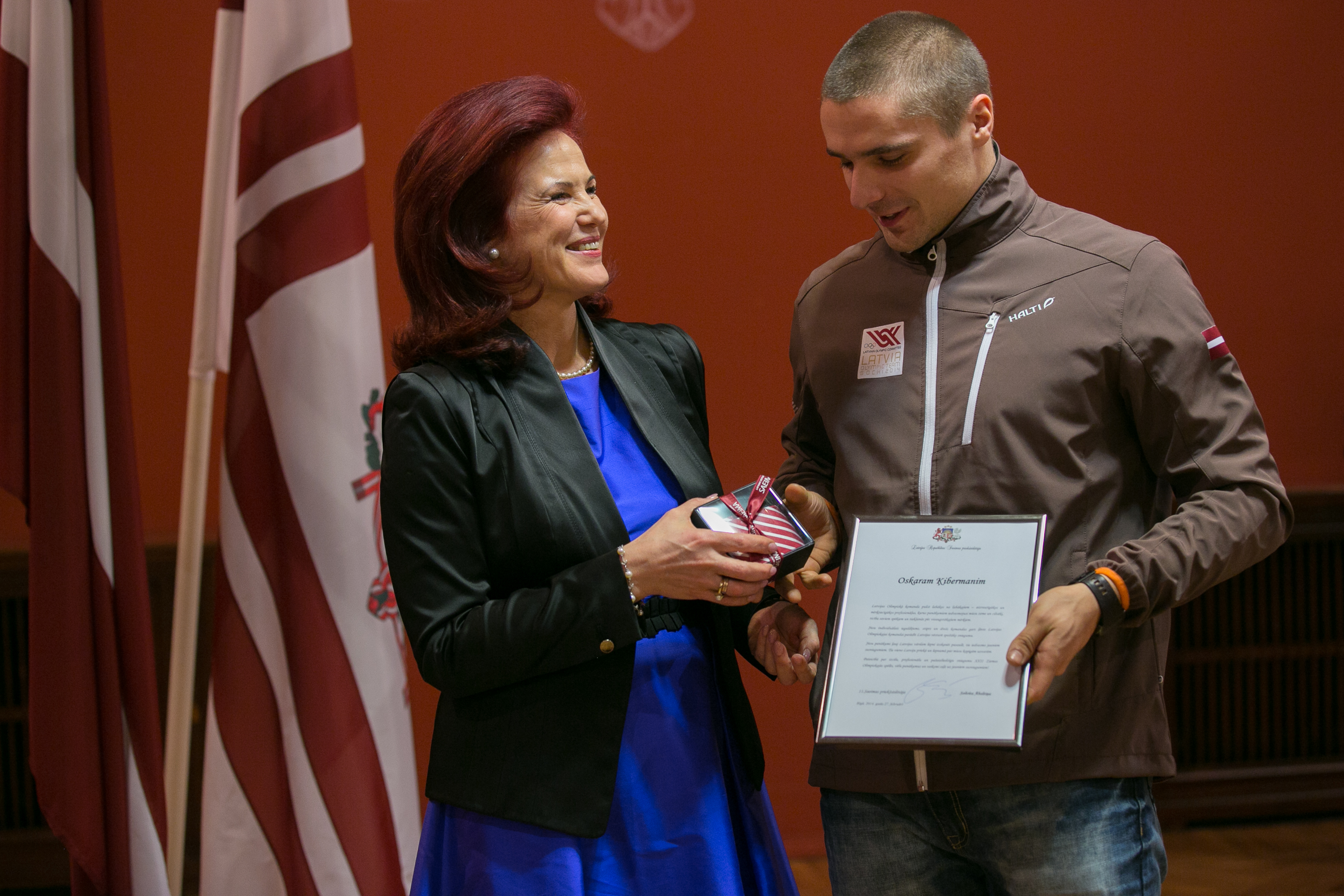 2014.gada 27.februāris. Saeimas priekšsēdētāja Solvita Āboltiņa tiekas ar Latvijas olimpisko komandu XXII Ziemas olimpiskajās spēlēs Sočos. Foto: Ernests Dinka, Saeimas Kanceleja Izmantošanas noteikumi: saeima.lv/lv/autortiesibas Solvita Āboltiņa tiekas ar Latvijas olimpisko komandu XXII Ziemas olimpiskajās spēlēs Sočos.